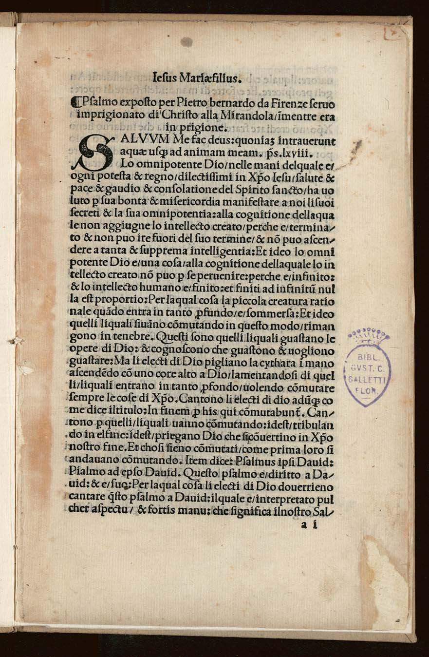 Incipit